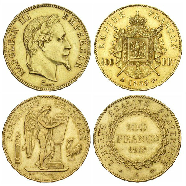 Pièces françaises de 100 francs or.